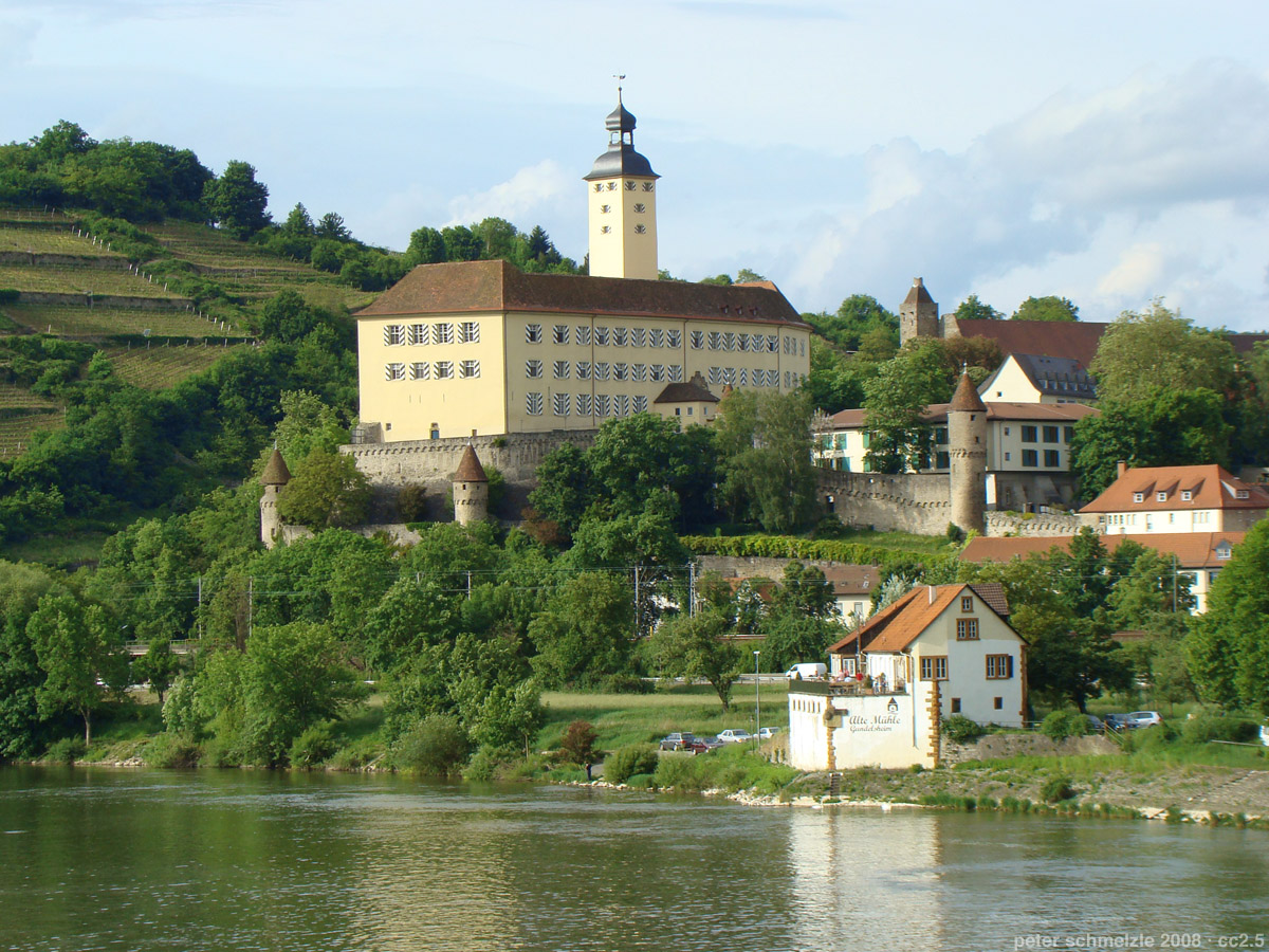 Burg Horneck in Gundelsheim (Württemberg)